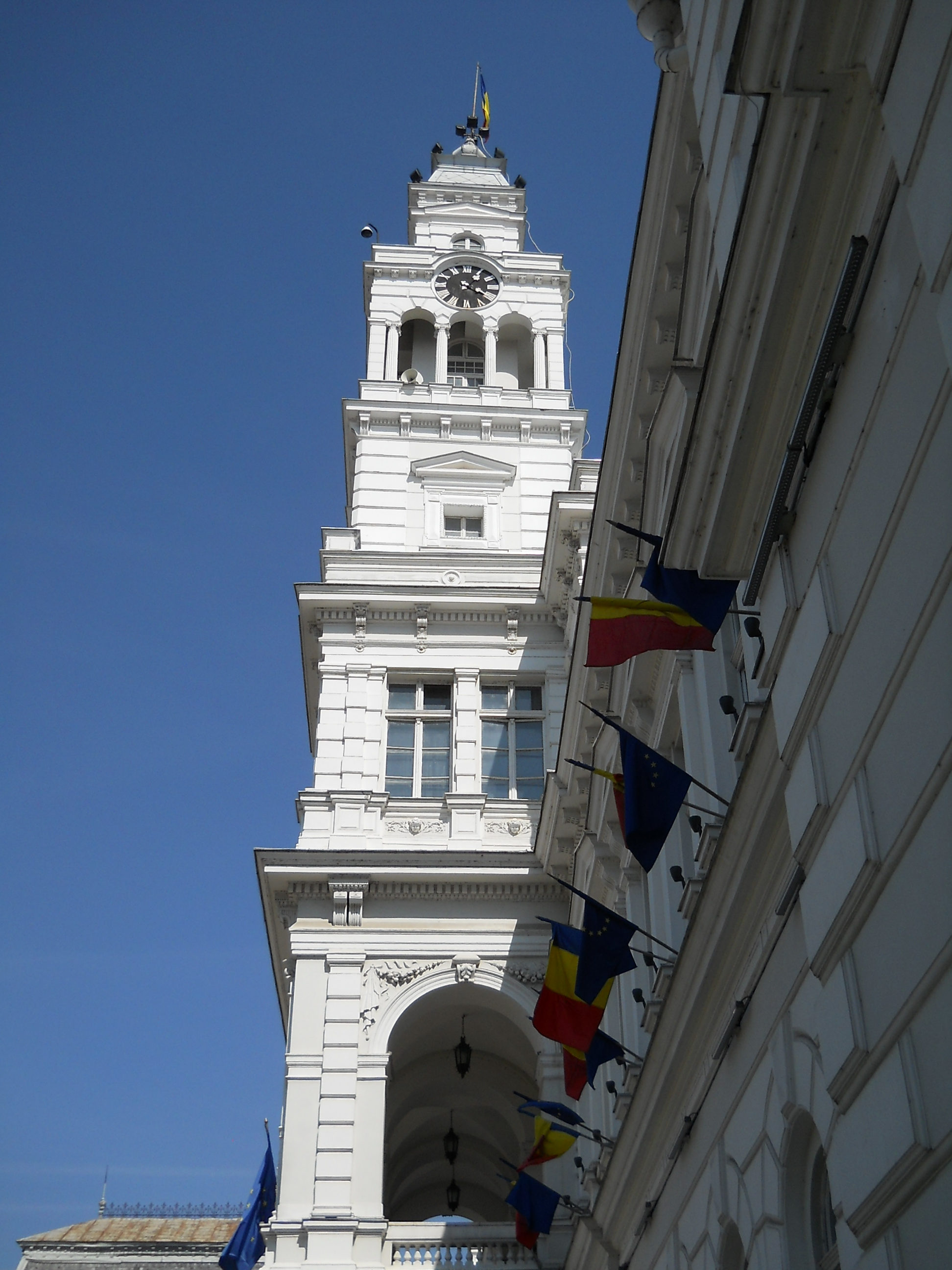 Turnul Primariei vazut din lateral